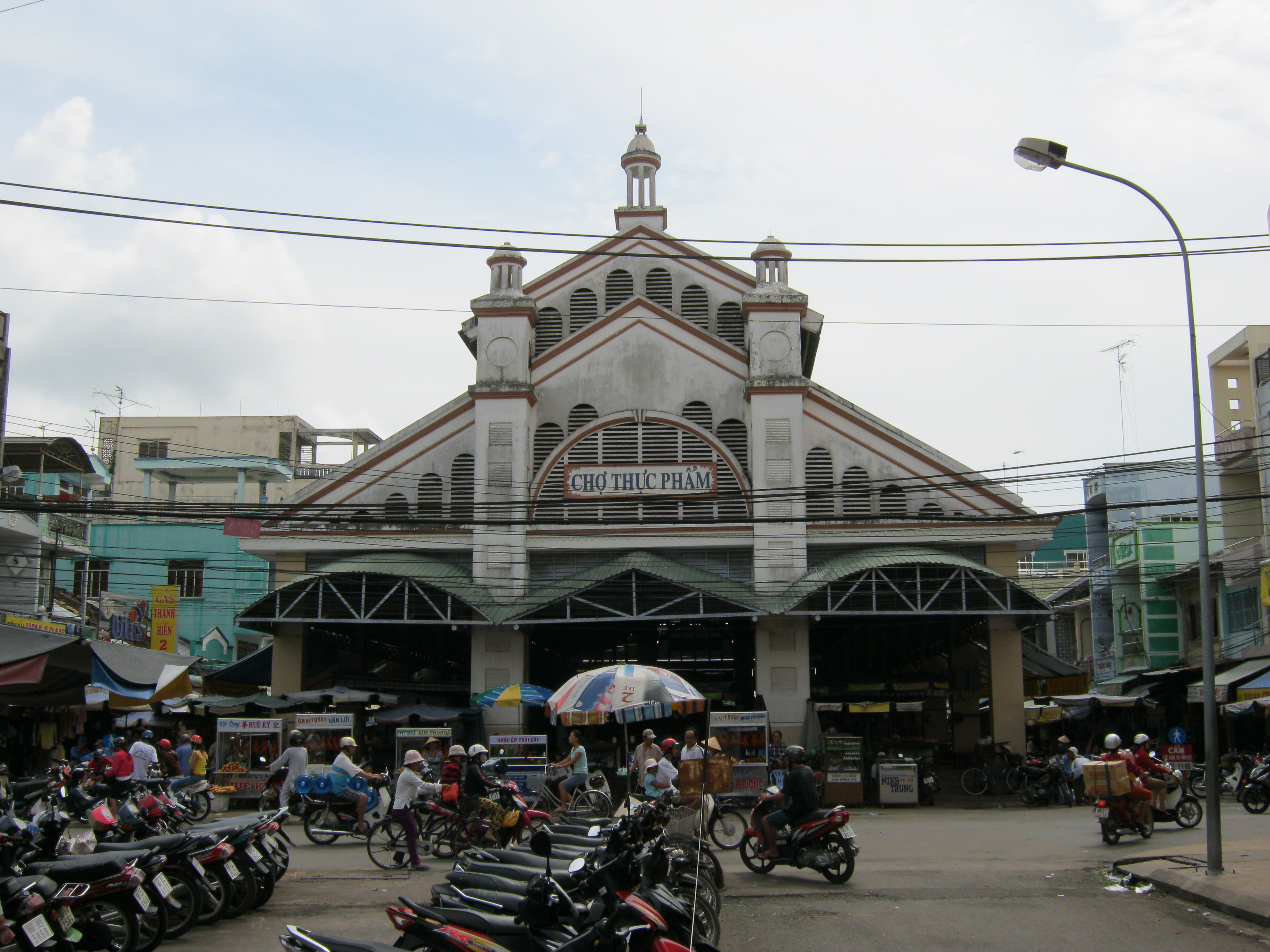 Chợ Sa Đéc (Đồng Tháp, Việt Nam)